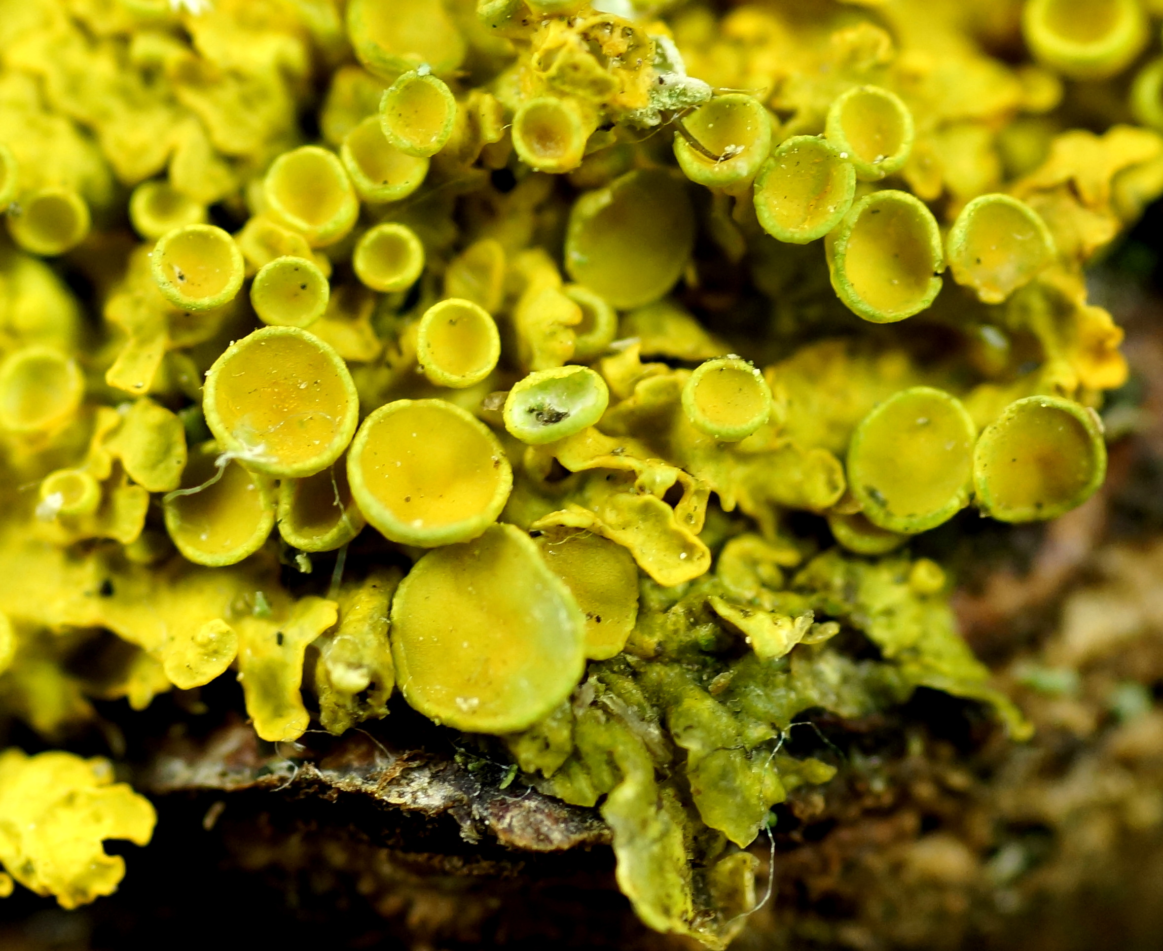 Gewöhnliche Gelbflechte, Lichenes, Deutschland, Bayern, Oberfrankern, Selbitz Photo: U.Schmidt, 6.X.2012